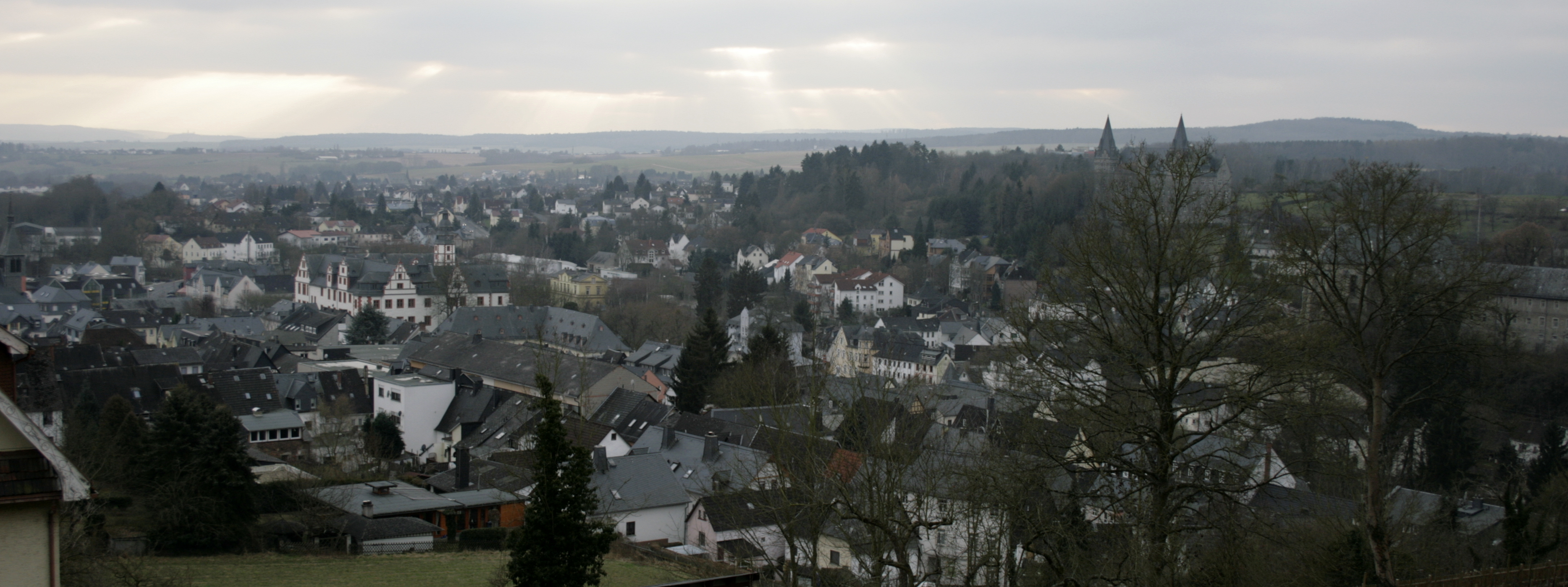 Sicht auf die Stadt Hadamar, Deutschland, vom Herzenberg (Norden) aus